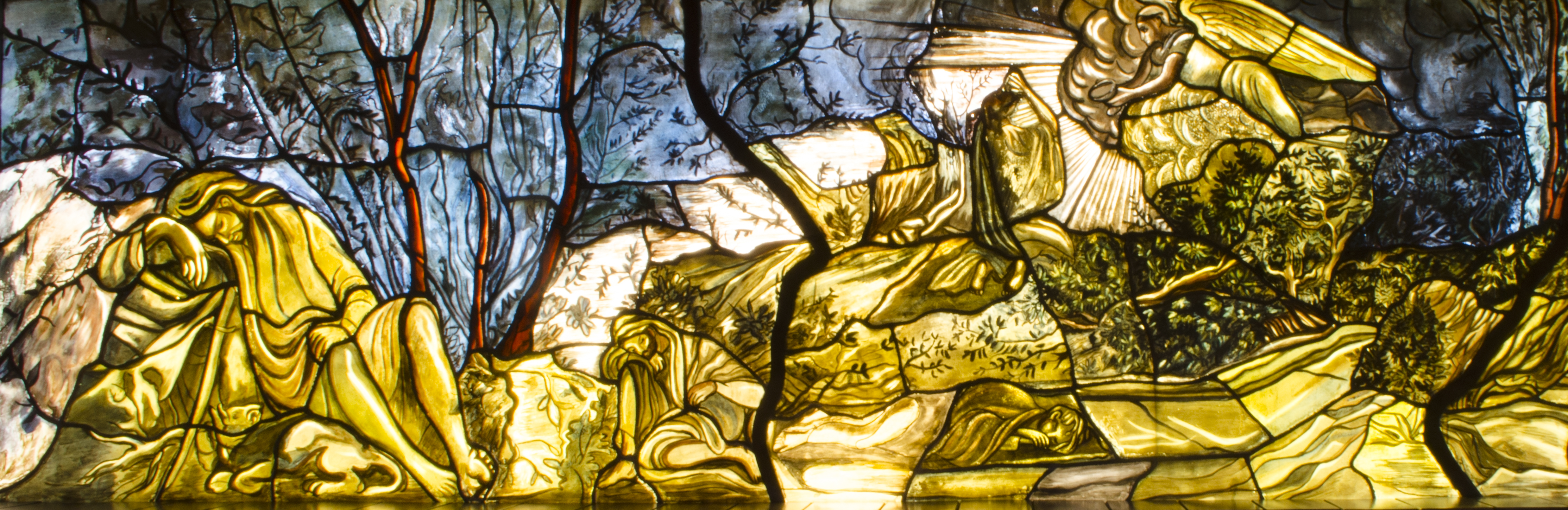 vitral ( El Huerto de Getsemaní 1957) en la capilla de los misioneros de Guadalupe - Federico Cantú